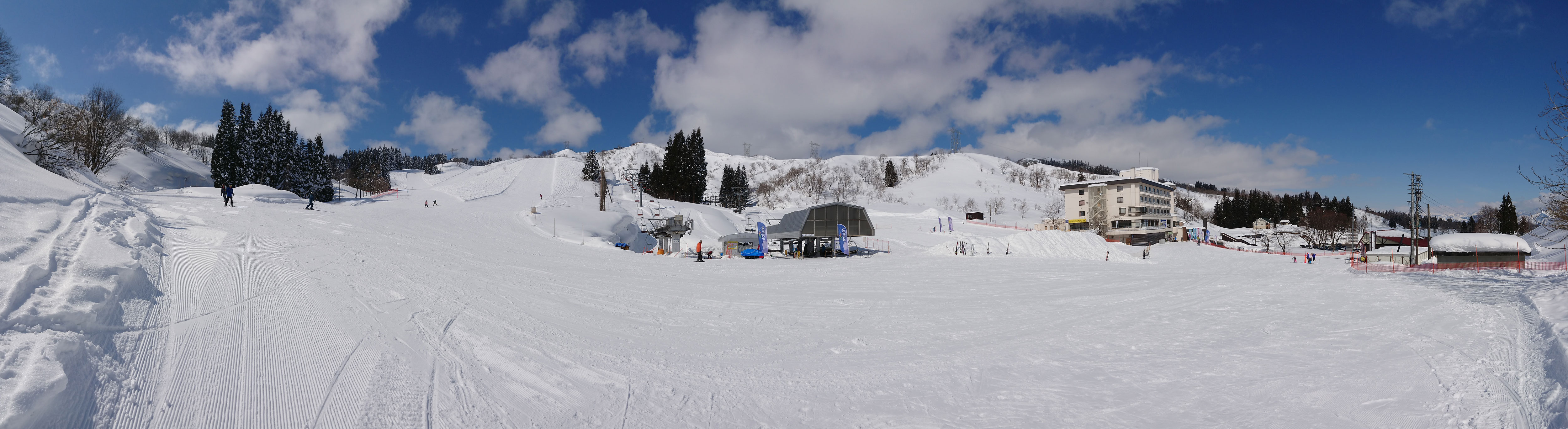 ムイカスノーリゾート ベース部のパノラマ写真(カナリア,ロビン,シーガル,第1ペア,第1クワッド,キッズパーク,むいか温泉ホテル,駐車場,山麓ロッジ) 2018年2月撮影